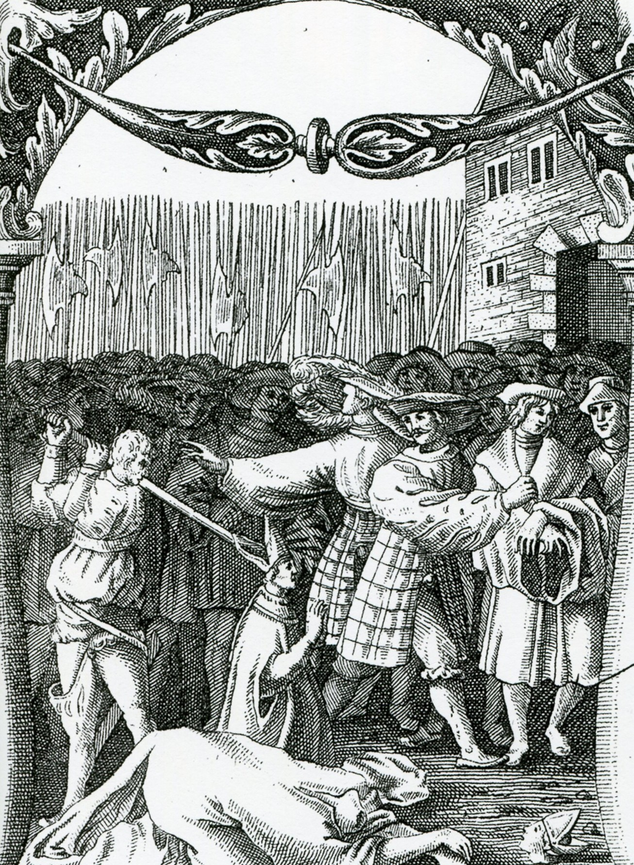 Blodbadsplanschen, detalj